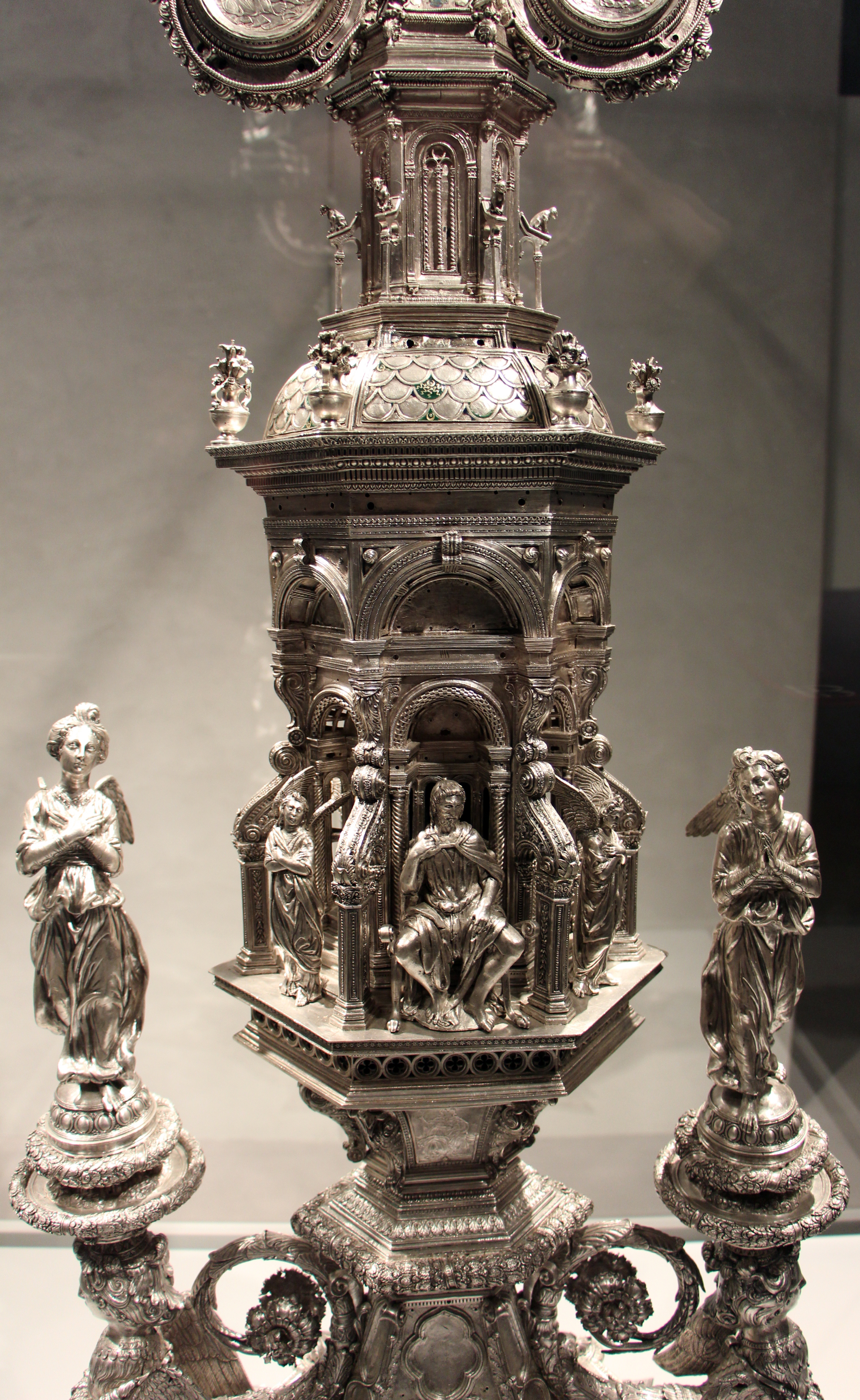 Croce-ostensorio dell'Opera del Duomo (Firenze)